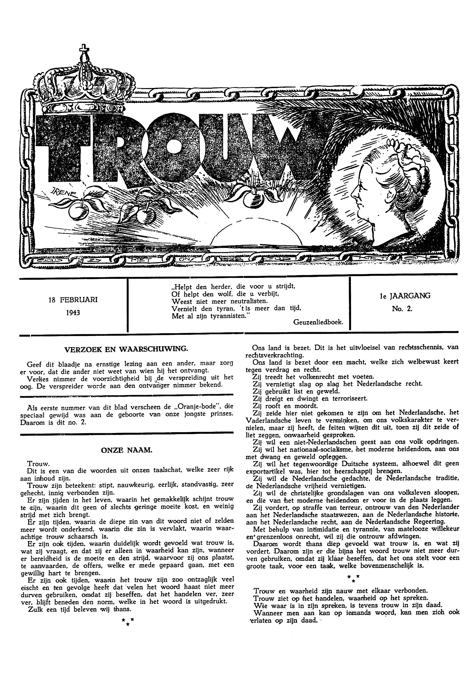 "Trouw", 1e jaargang, nummer 2, 18 februari 1943